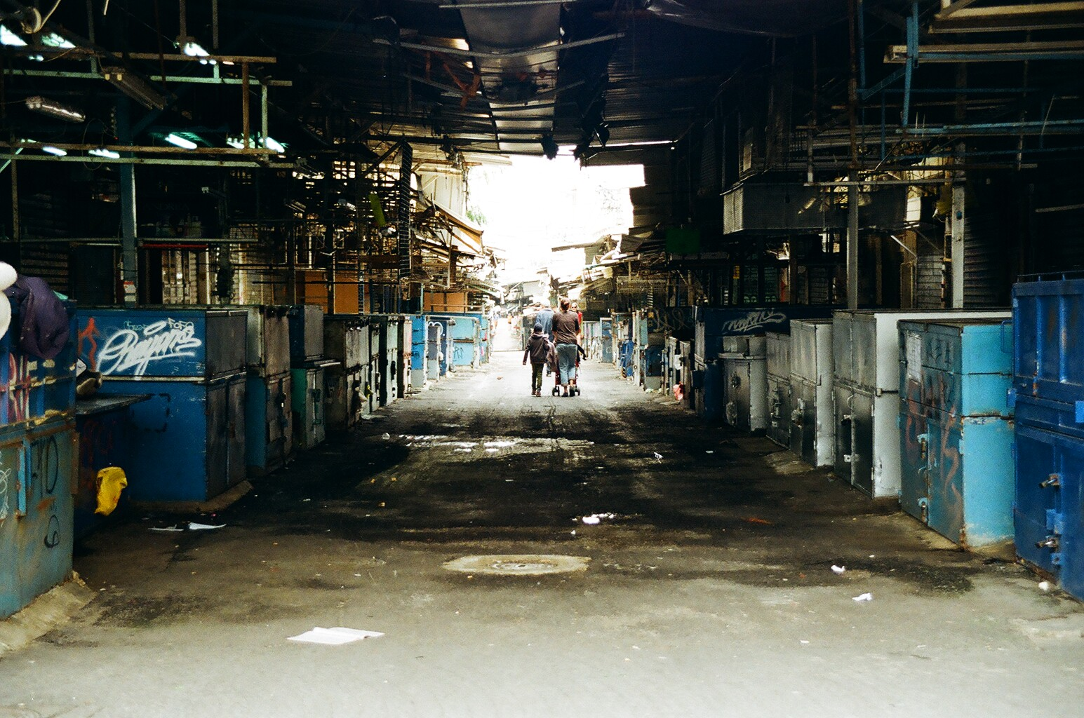 שוק הכרמל ביום חג